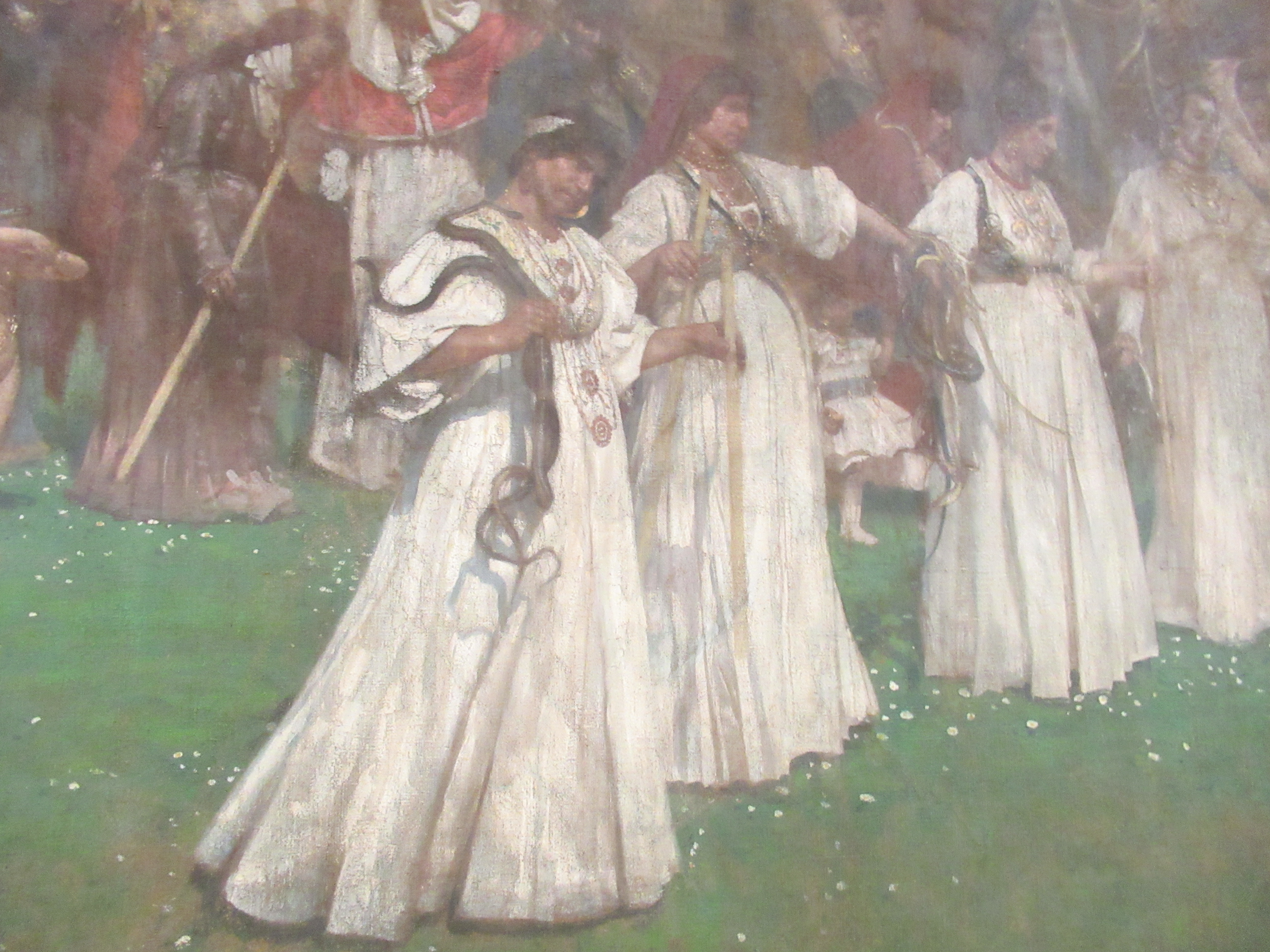 15 giugno 2018 Le serpi di Francesco Paolo Michetti fotografate durante un saggio di canto al Mumi